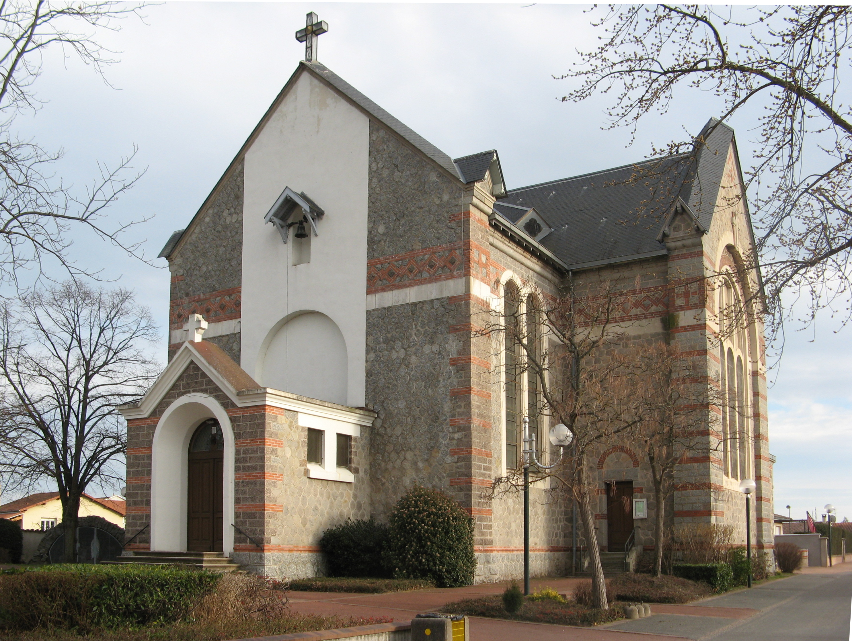 Savigneux (Loire) : église